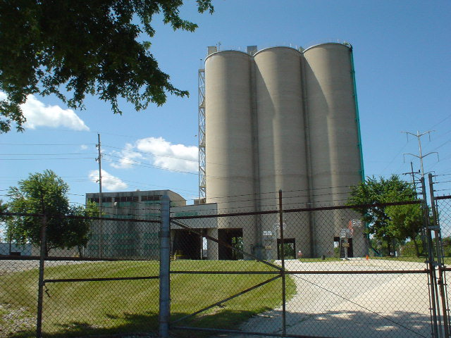 Cement silo